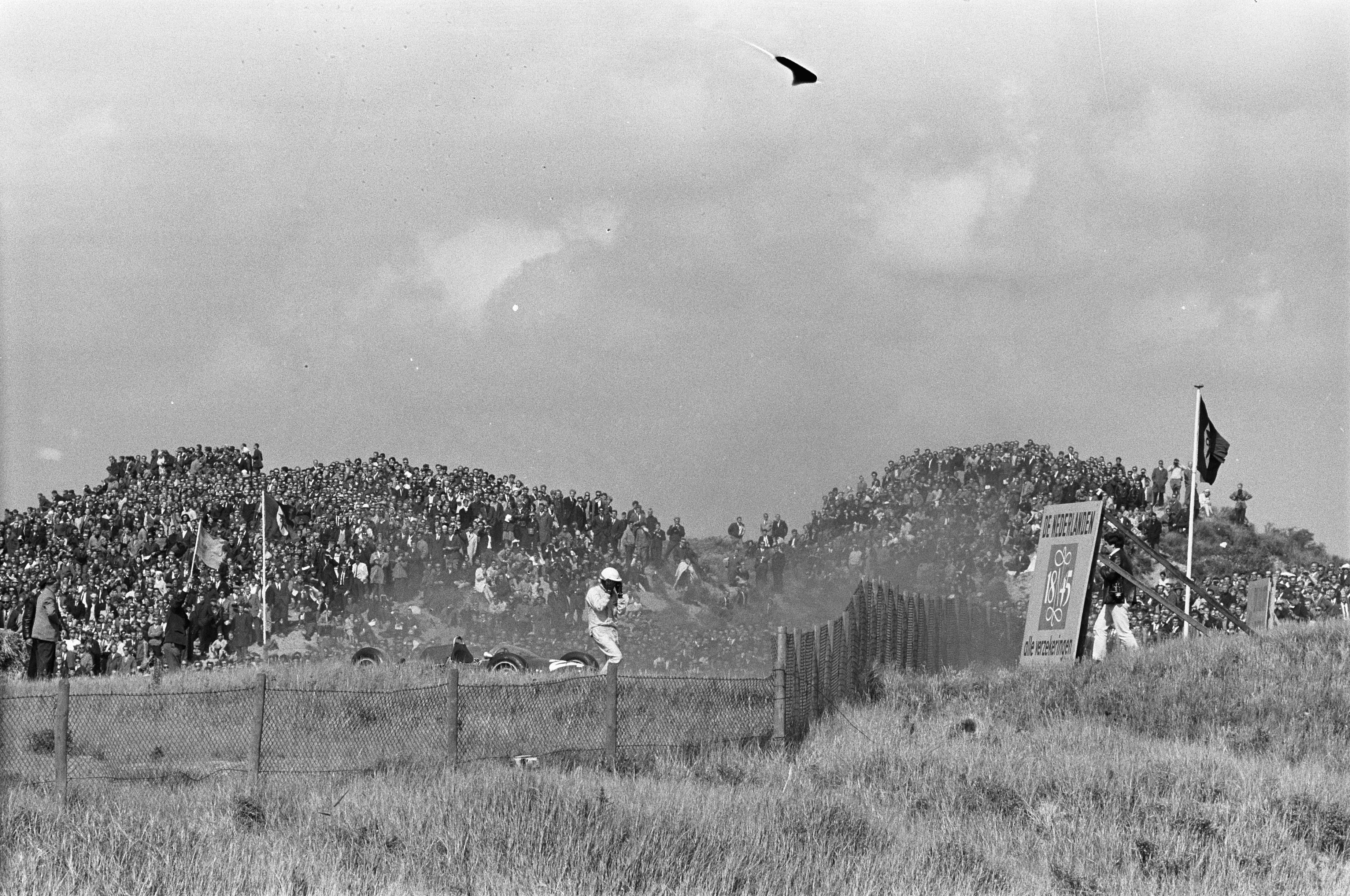 Grand Prix te Zandvoort. Phil Hill remde zijn wagen uit daar hij bang was dat deze in brand vloog.